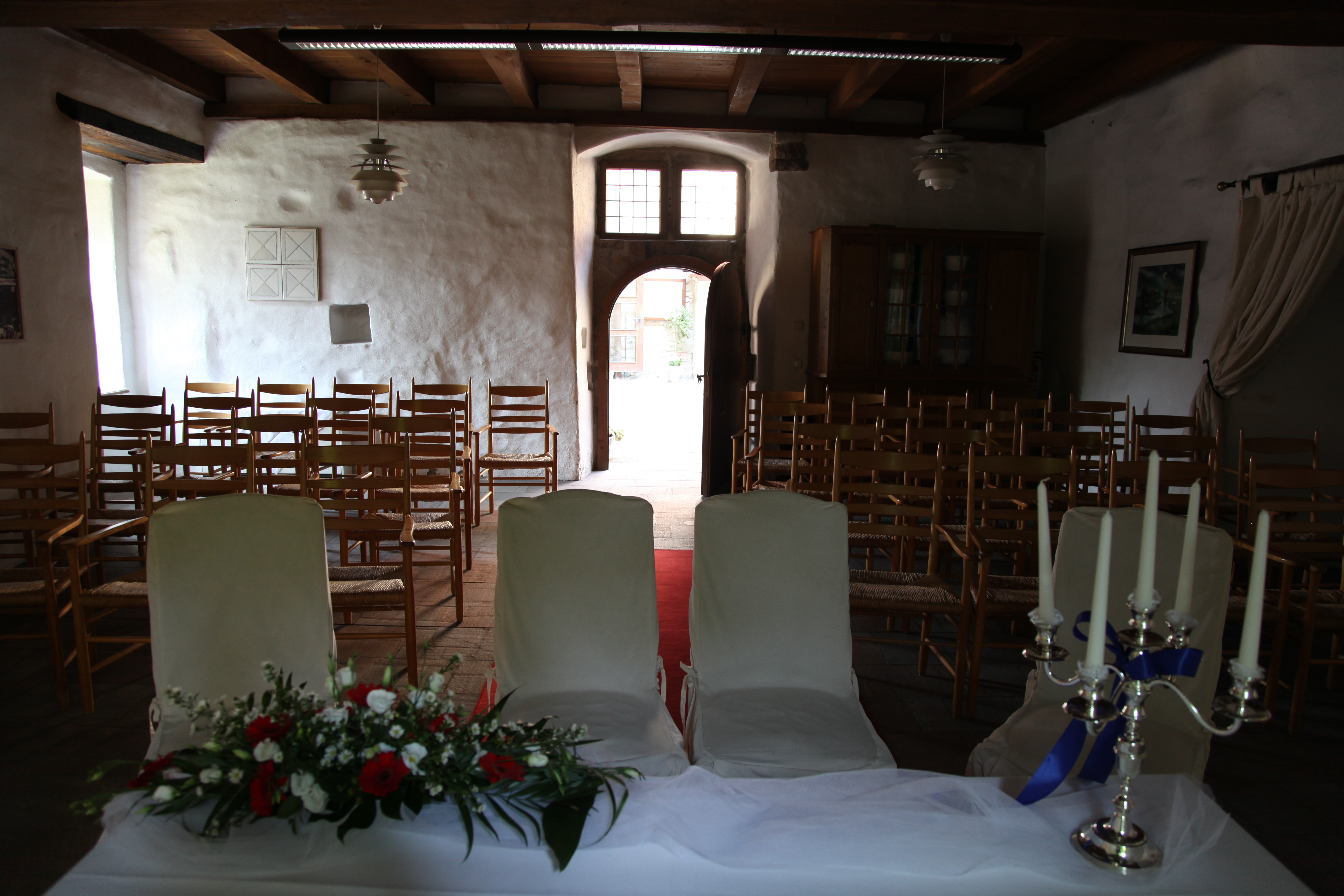 Trauzimmer im Haus Herbede, Von-Elverfeldt-Allee in Witten-Herbede